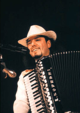 Foto ufficiale di Santino Spinelli "Alexian"